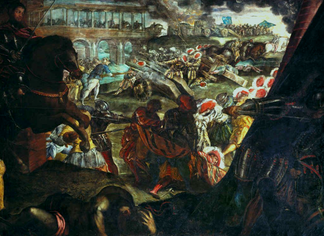 Federico II Gonzaga difende Pavia - Olio su tela, cm. 210 × 276.5